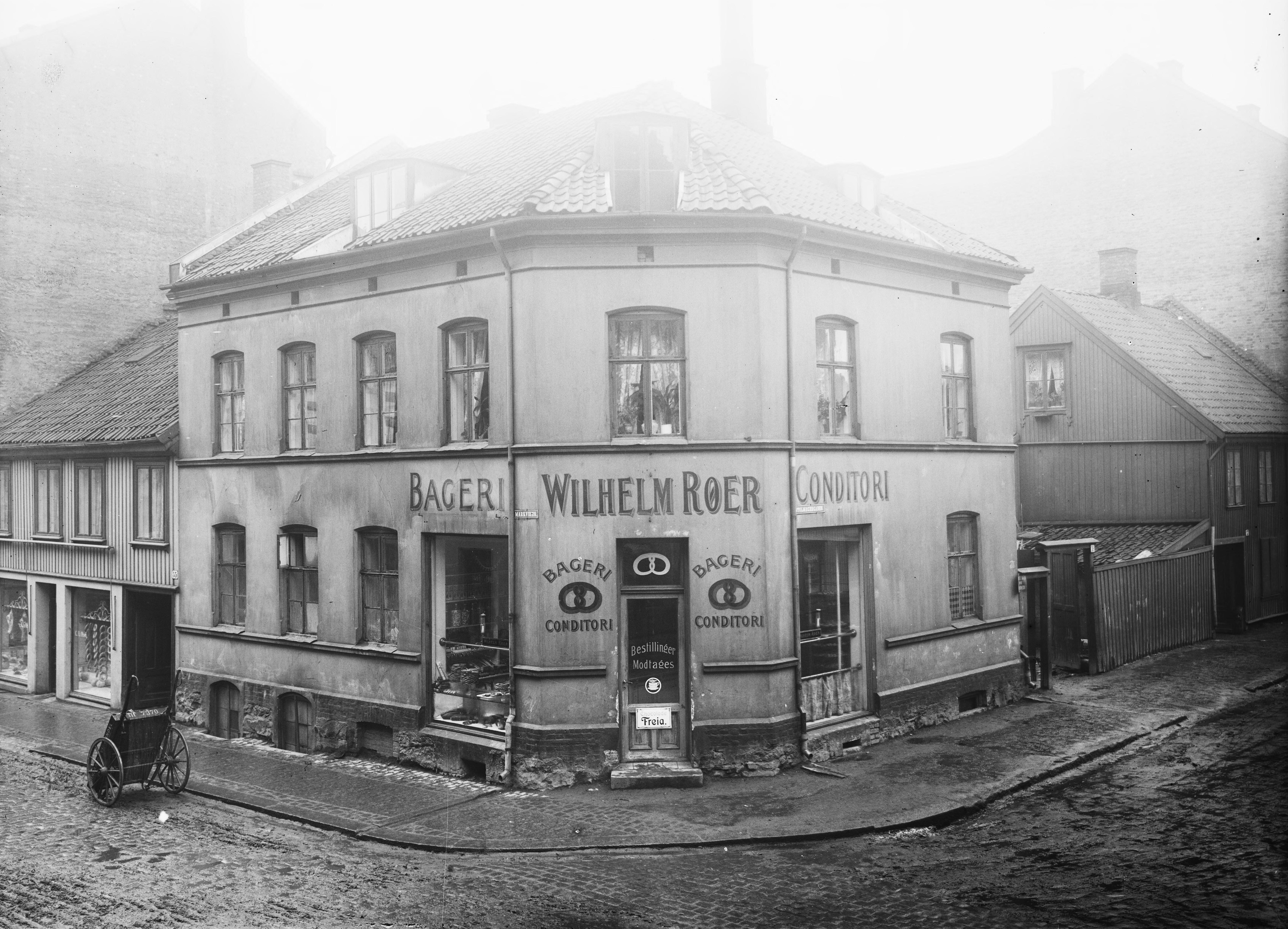 Bildet er hentet fra Nasjonalbibliotekets bildesamling. Anmerkninger til bildet var: Påskrift arkivark: Bager Wilhelm Røer. Stolmagergd. Eldste arkivnummer: 587 Yngre arkivnummer: 11, 32 Grünerløkka, Oslo, Oslo